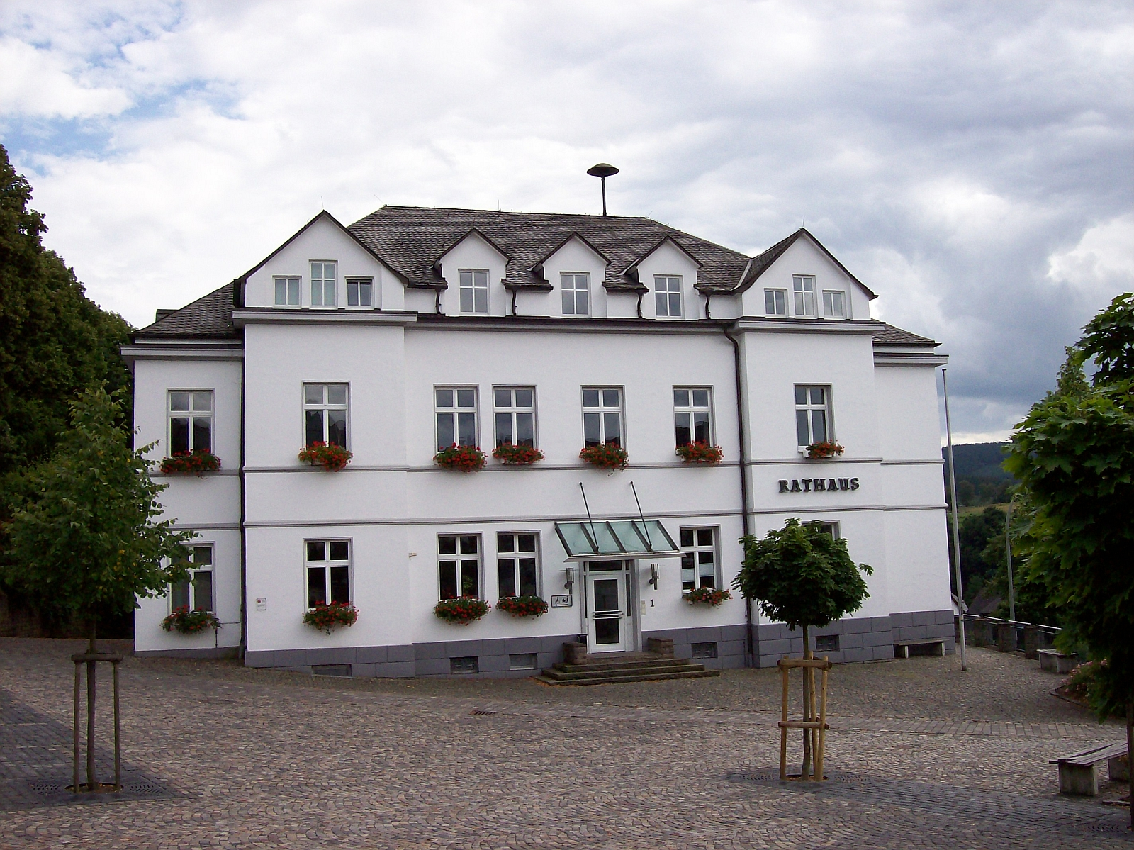 Altbau des Rathauses in Schmallenberg (ehemaliges Amtshaus erbaut 1895 bis 1897), Umbau in den Jahren 1922/1923